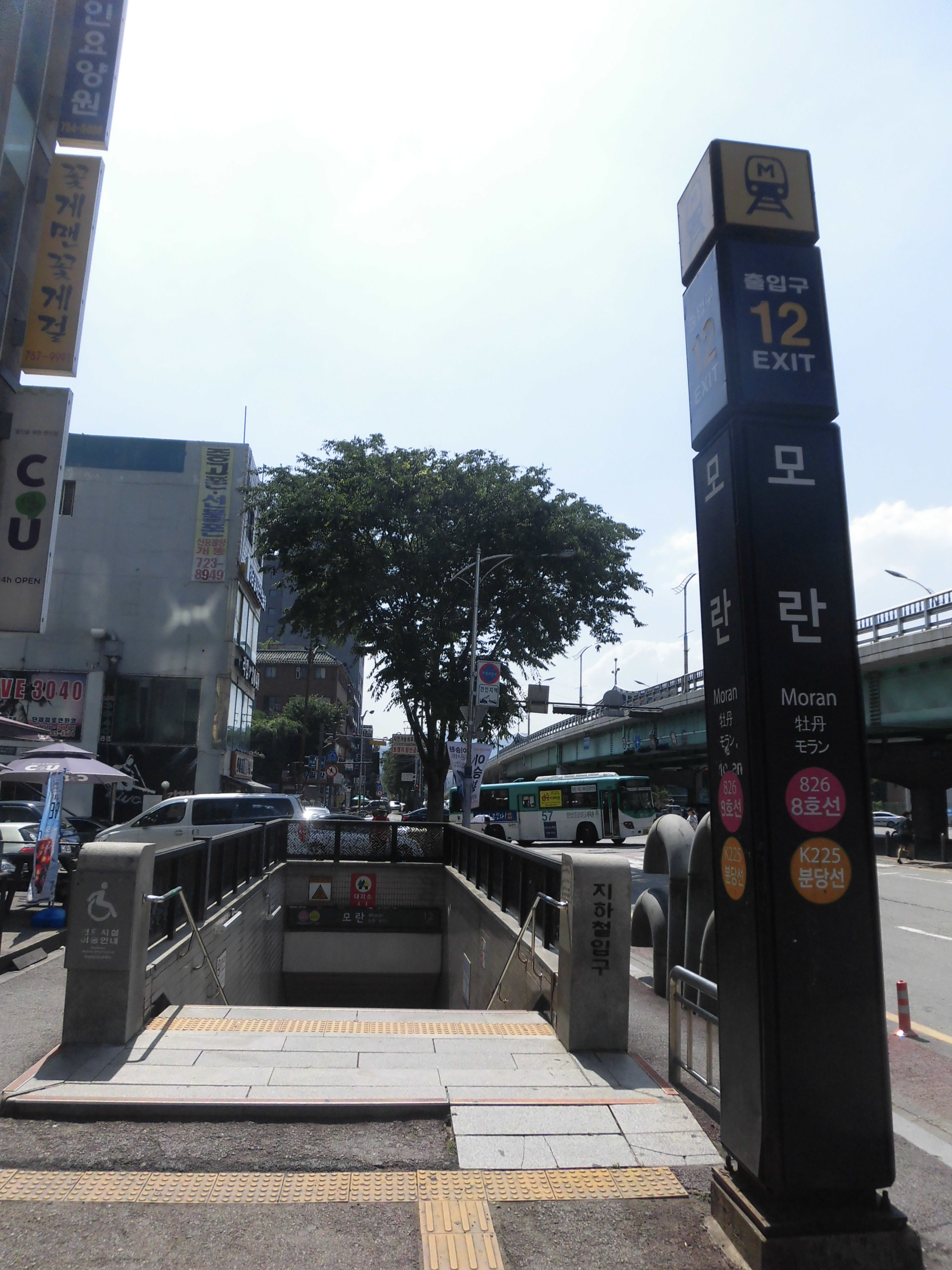 서울교통공사 8호선 모란역 12번출구